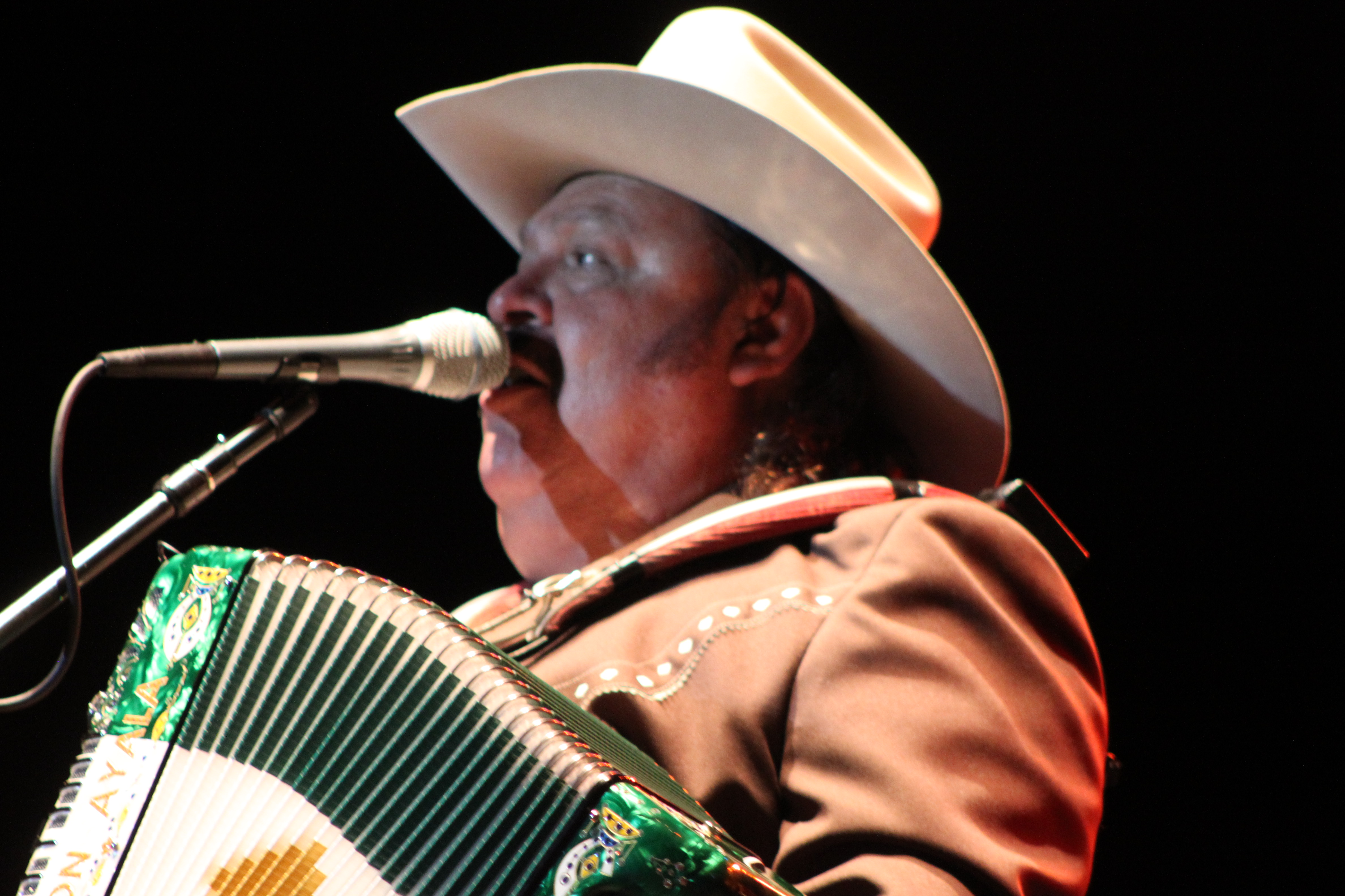 Ramón Ayala en un concierto el 21 de septiembre de 2012.